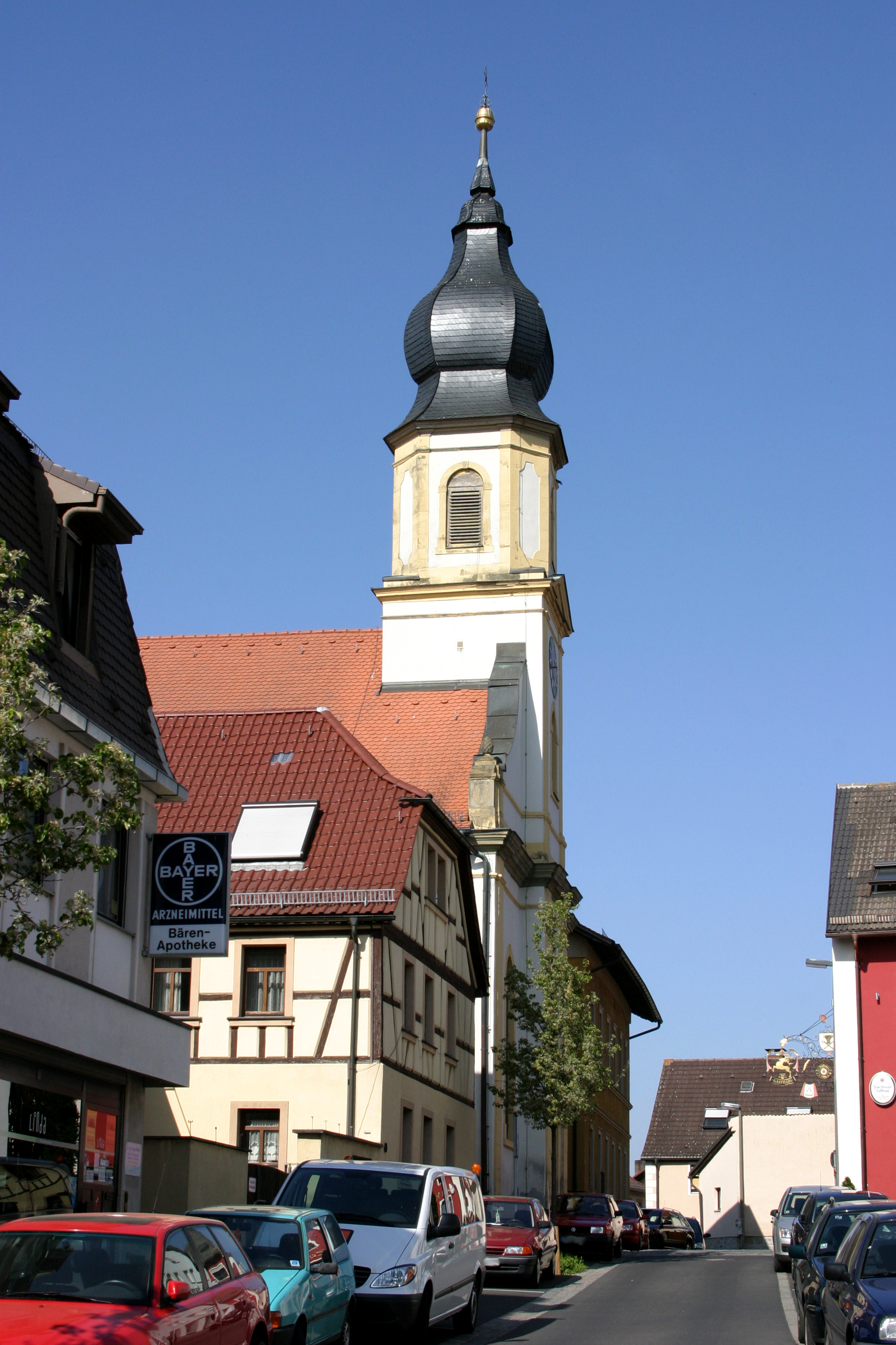 Sankt Laurentius Kirche in Lengfeld